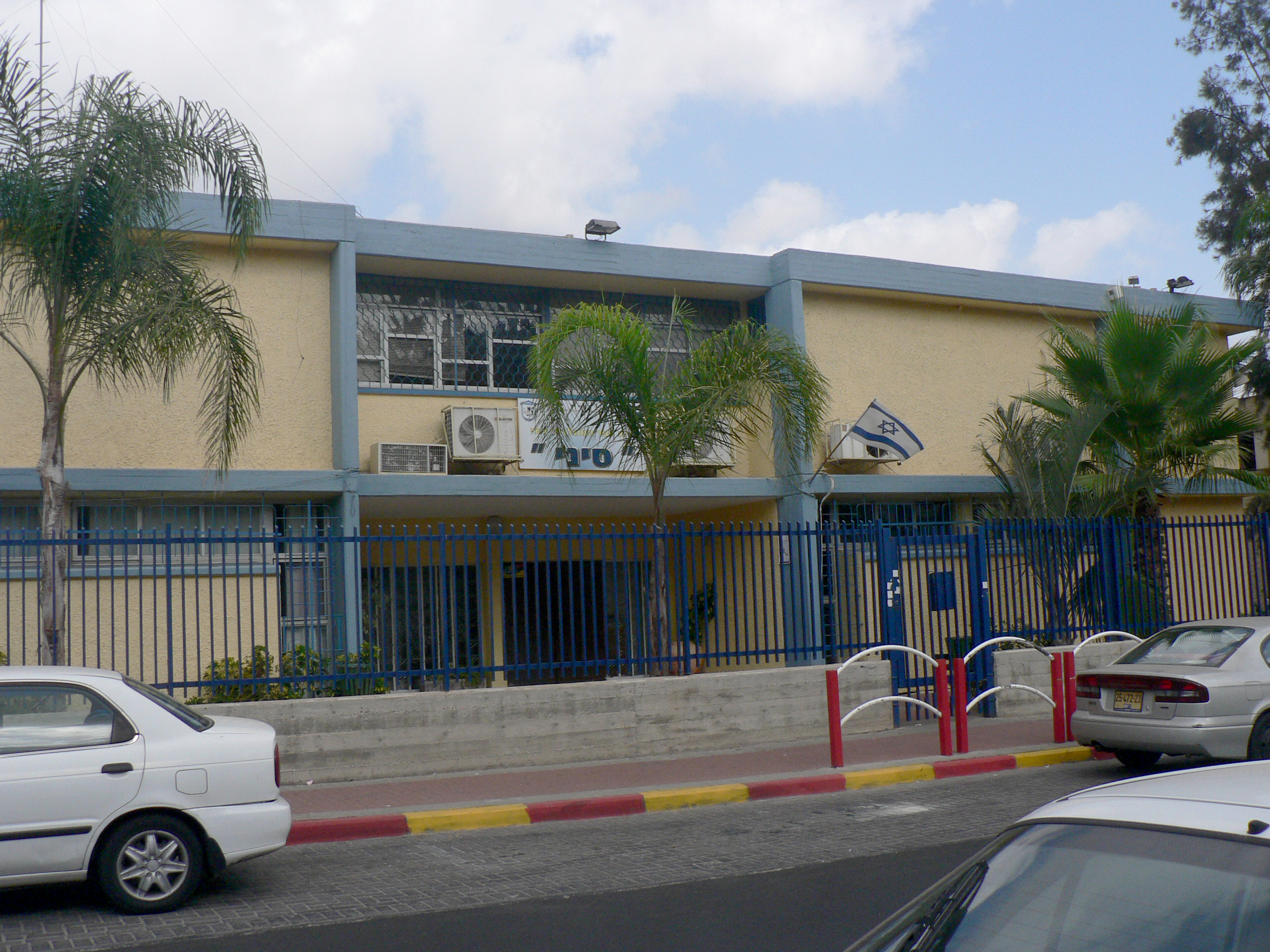 Sinai Religious National School, Rishon LeZion, Israel ראשון לציון - בית ספר ממלכתי דתי סיני